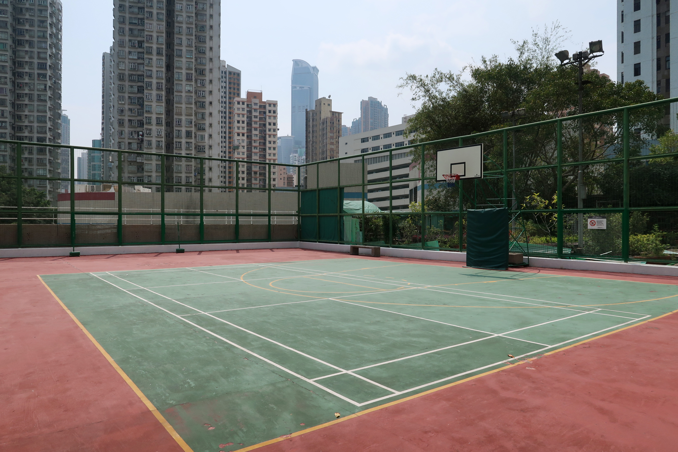 Luk Yeung Sun Chuen Basketball Court